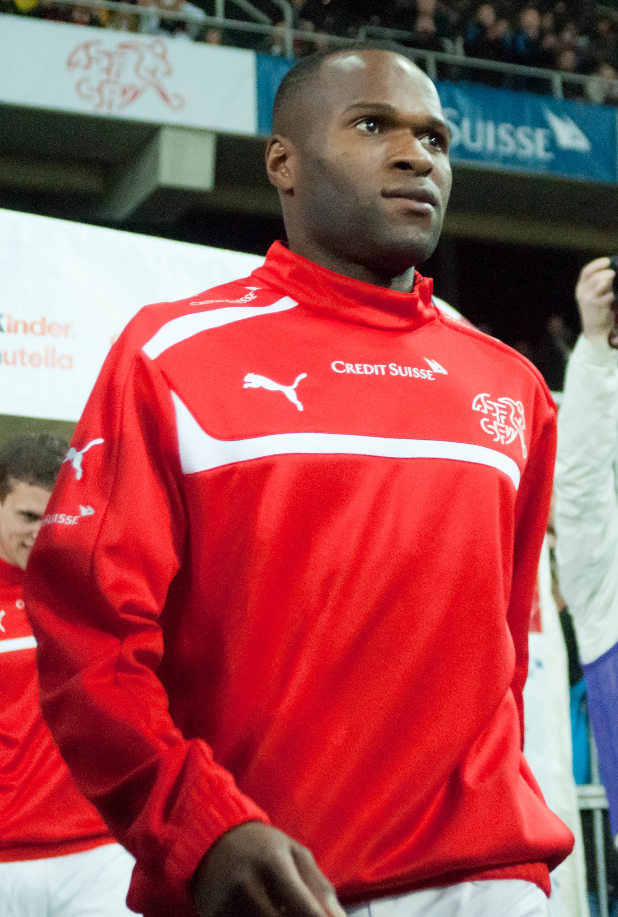 Innocent Emeghara avec l'équipe de Suisse en 2012.